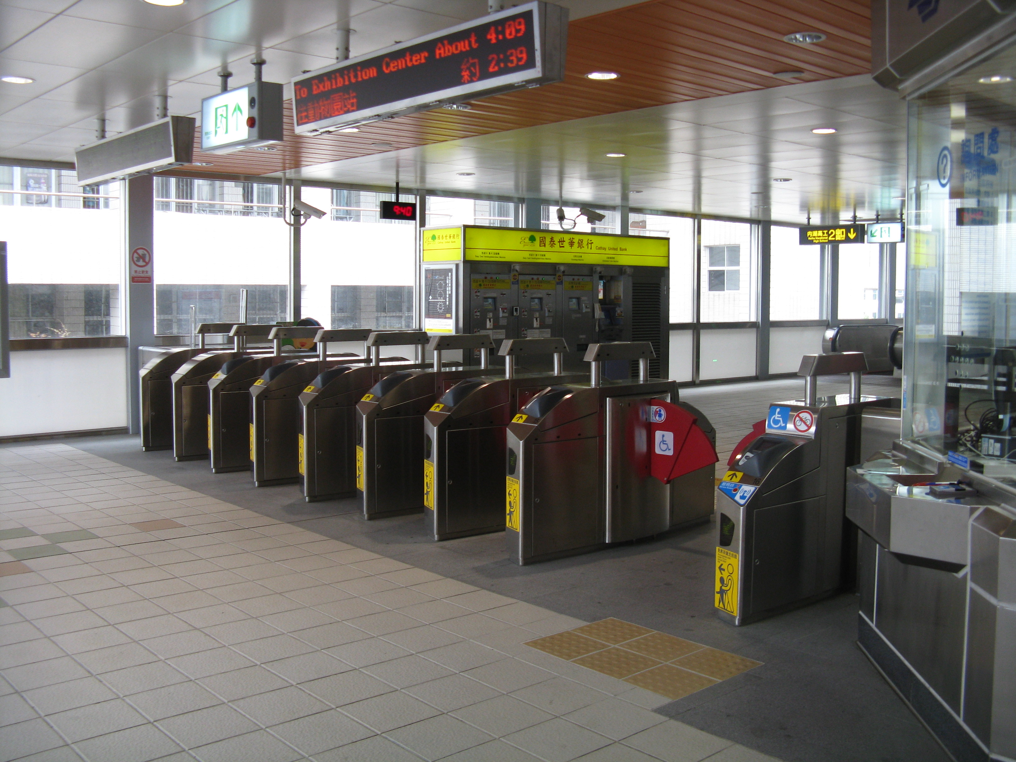 台北捷運内湖線港墘駅南改札口。